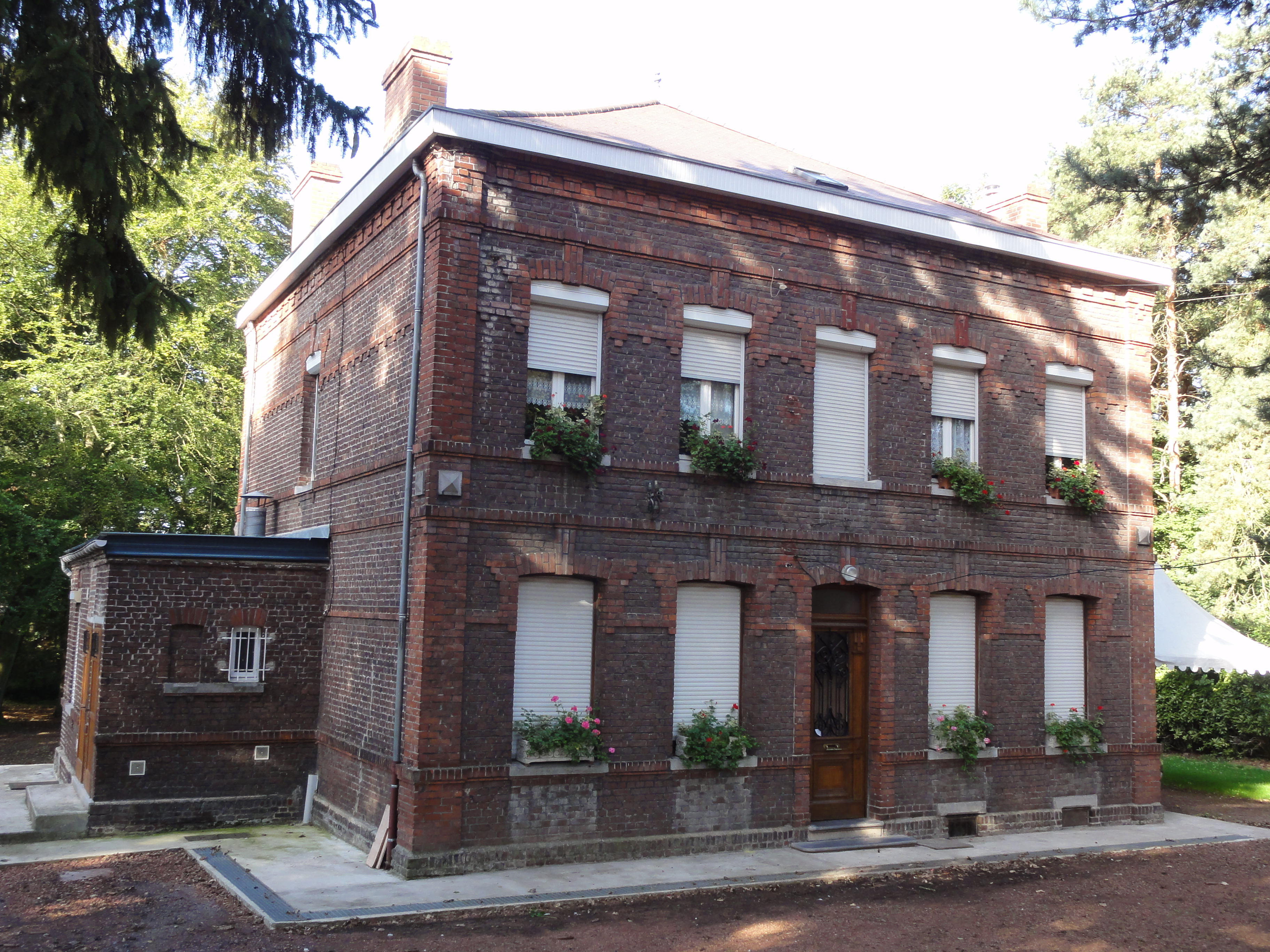 Habitation du directeur de la fosse Arenberg de la Compagnie des mines d'Anzin dans le bassin minier du Nord-Pas-de-Calais, Wallers, Nord, Nord-Pas-de-Calais, France.